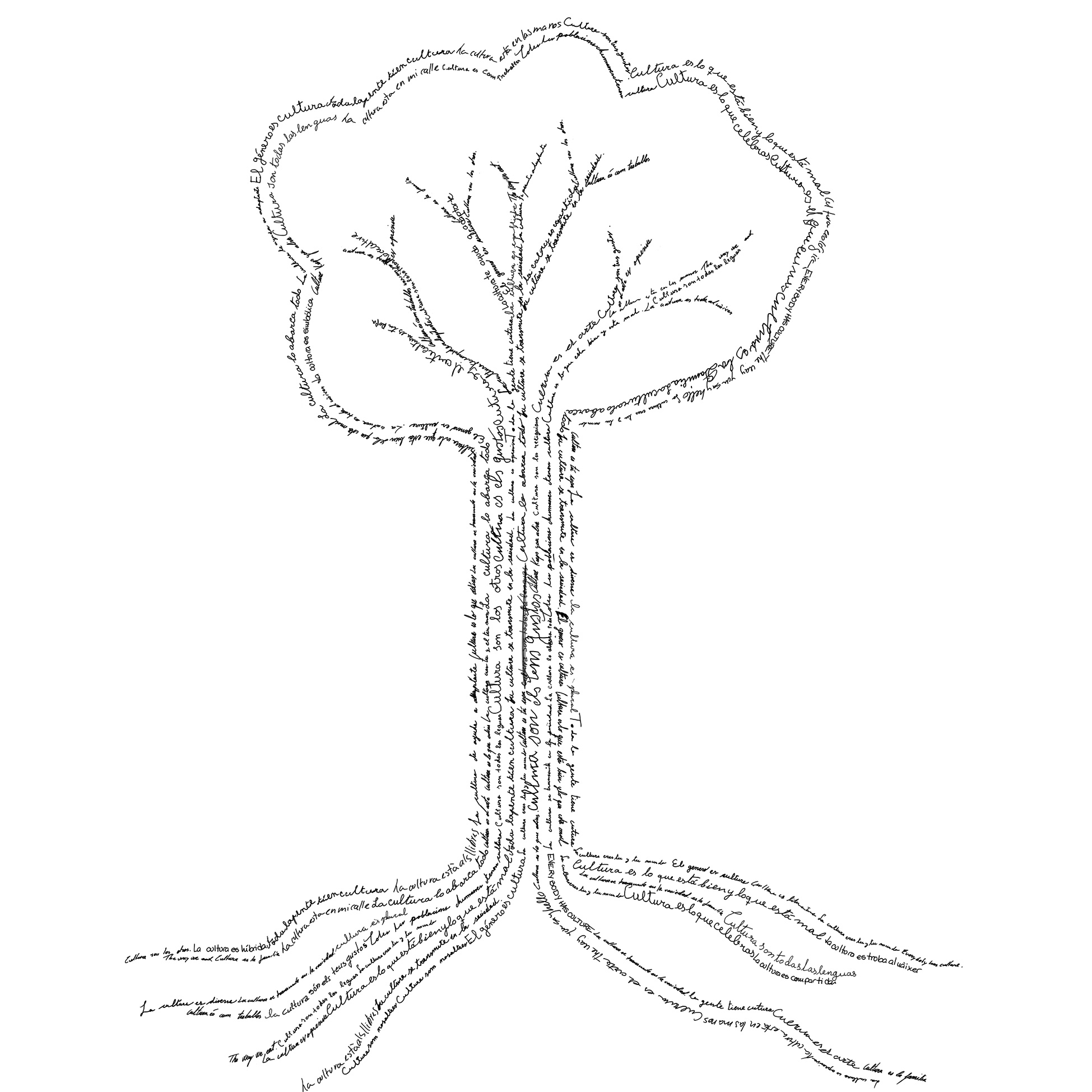 Cal·ligrames utilitzat a l'exposició permanent del Museu Valencià d'Etnologia. Imatges realitzades per Andrés Marín Jarque on, imitant la cal·ligrafia de gent major, es recullen definicions donades per visitants del museu sobre què és la cultura.